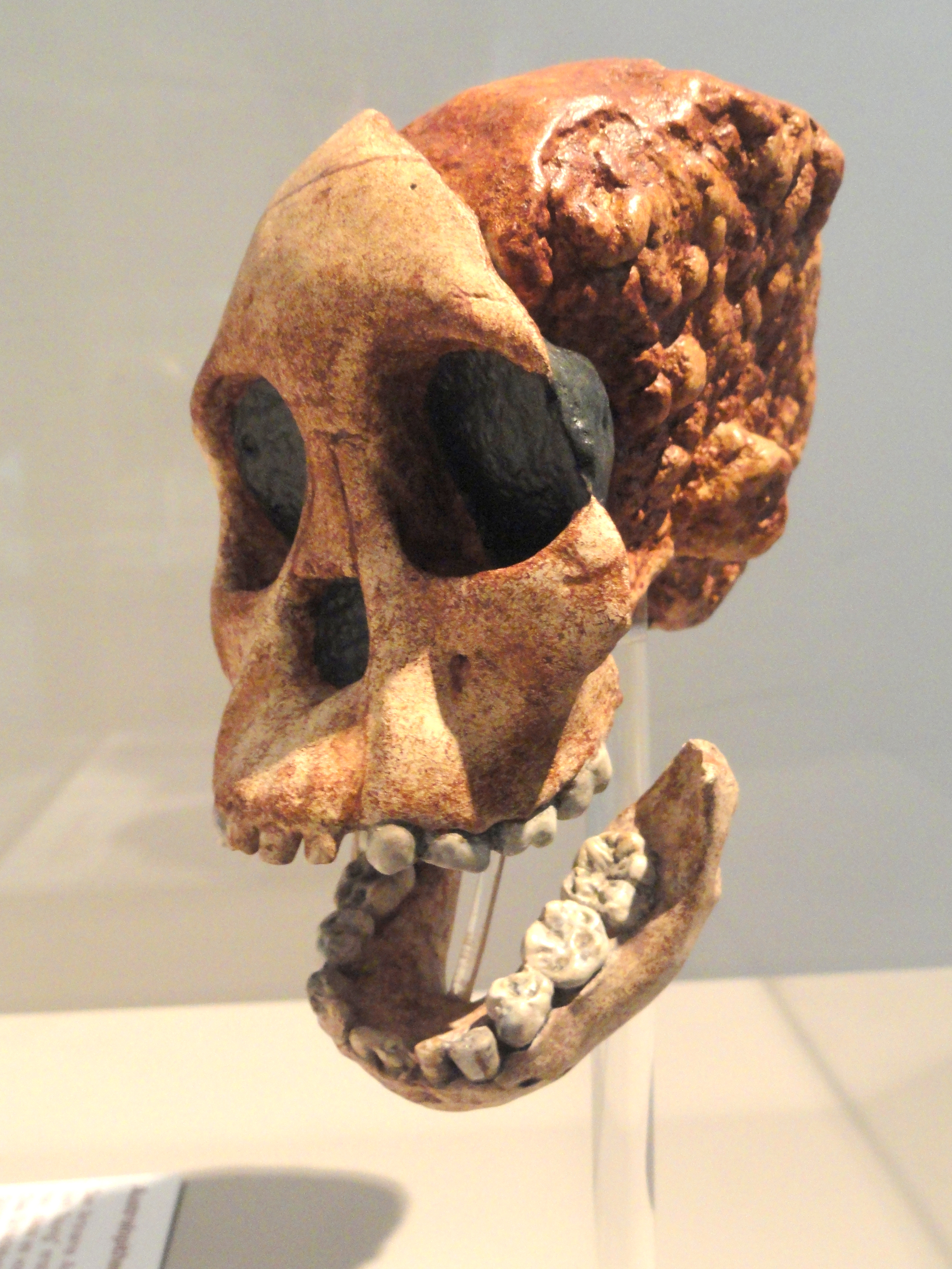 Exhibit in Naturmuseum Senckenberg, Frankfurt am Main, Germany.